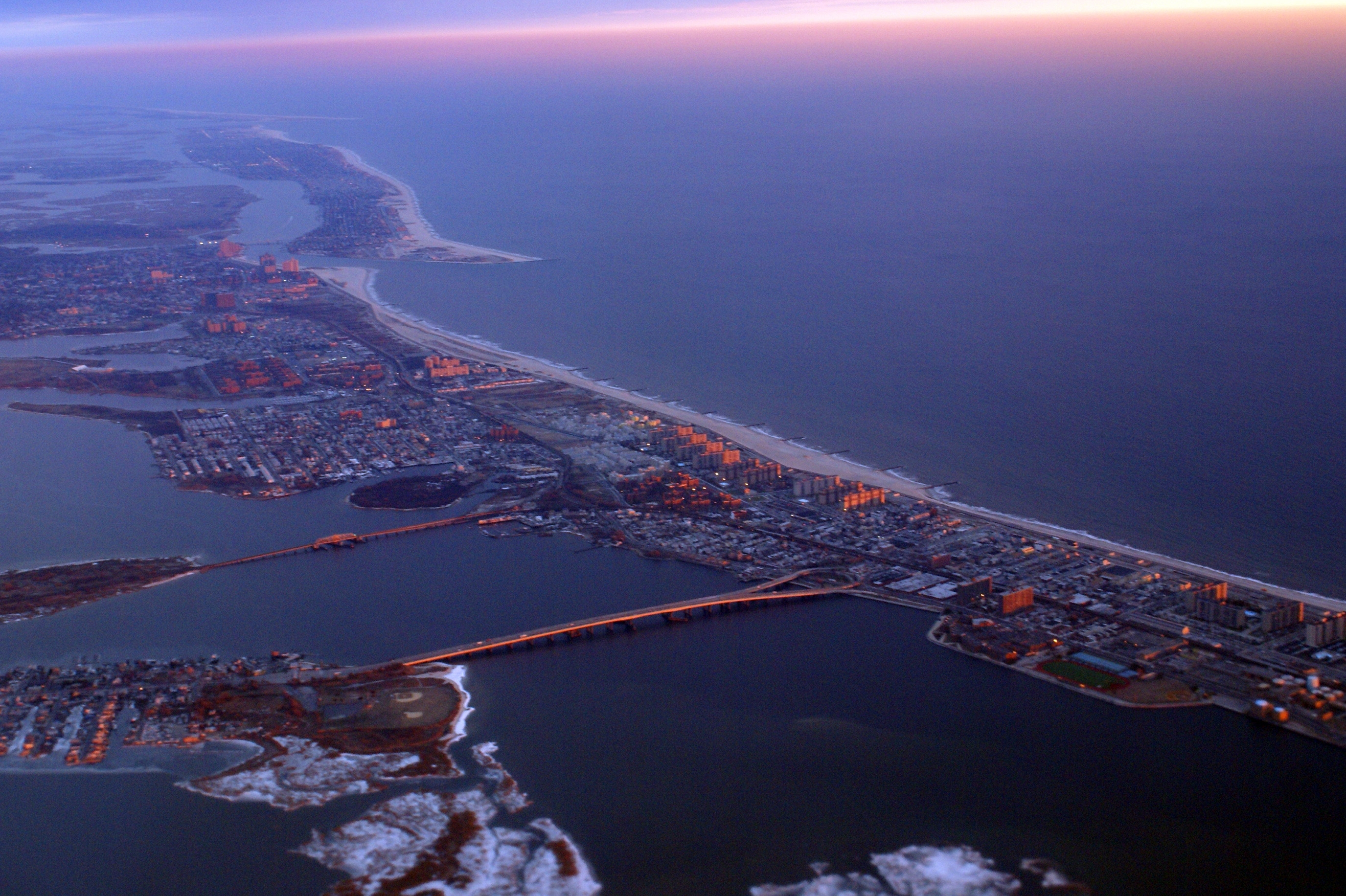 MSN 564 A310-304 CSA JFK NOW MAHAN AIR AS EP-MNX